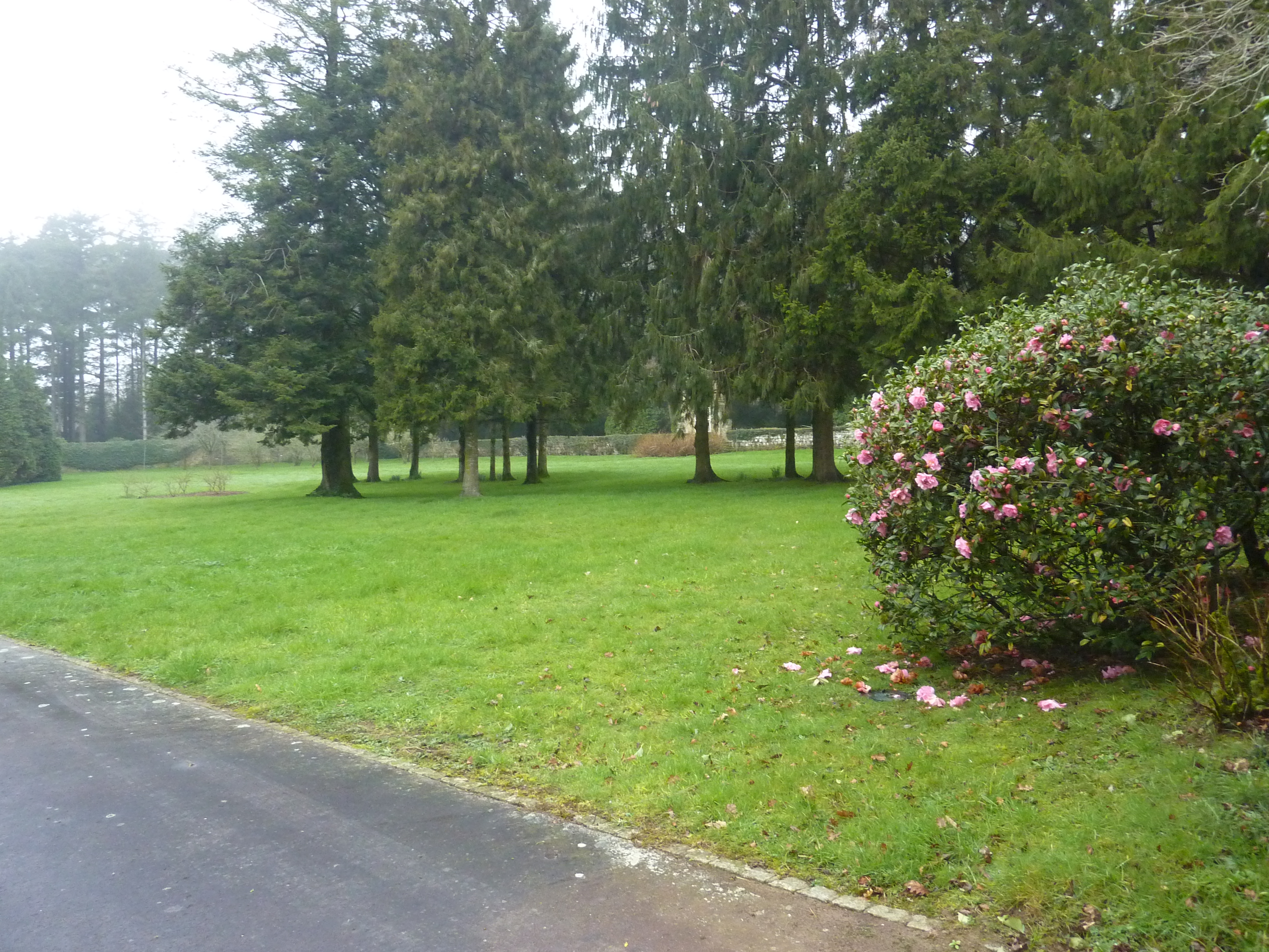 Loperhet : le parc du château de Kerancoat